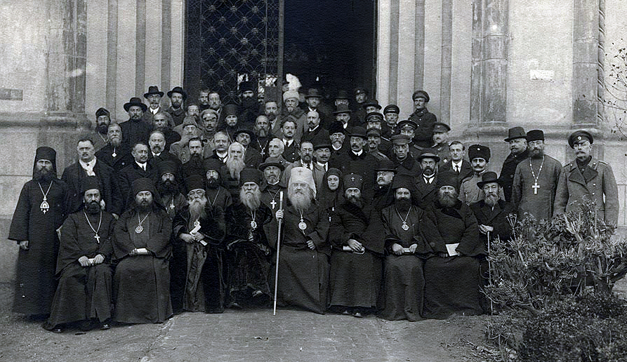 Участники собора 1921